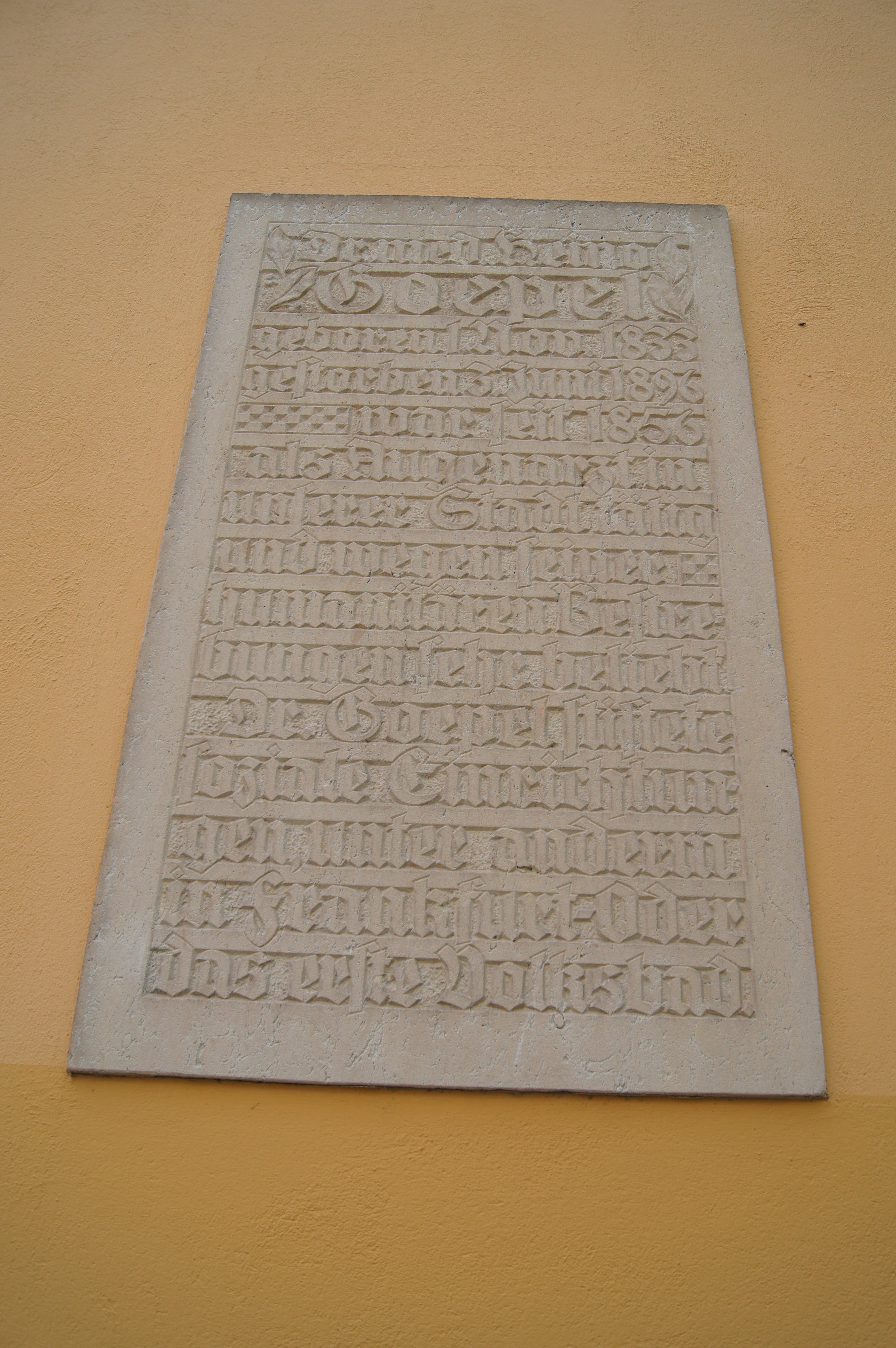 Gedenkplatte für Heino Goepel am Marienbad II in Frankfurt (Oder), Deutschland.